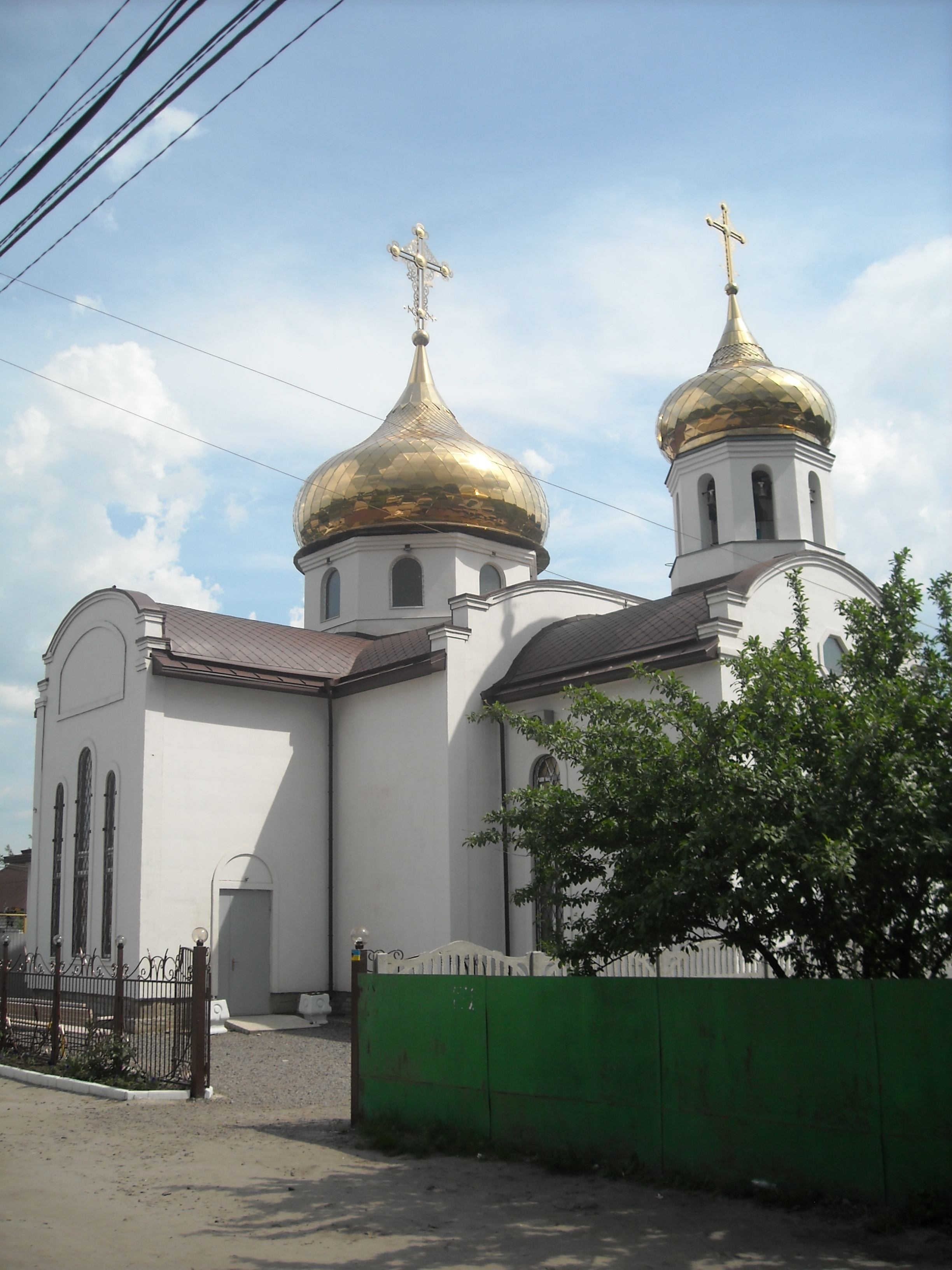 Харьков. Основа. ул. Зеленая. Церковь.